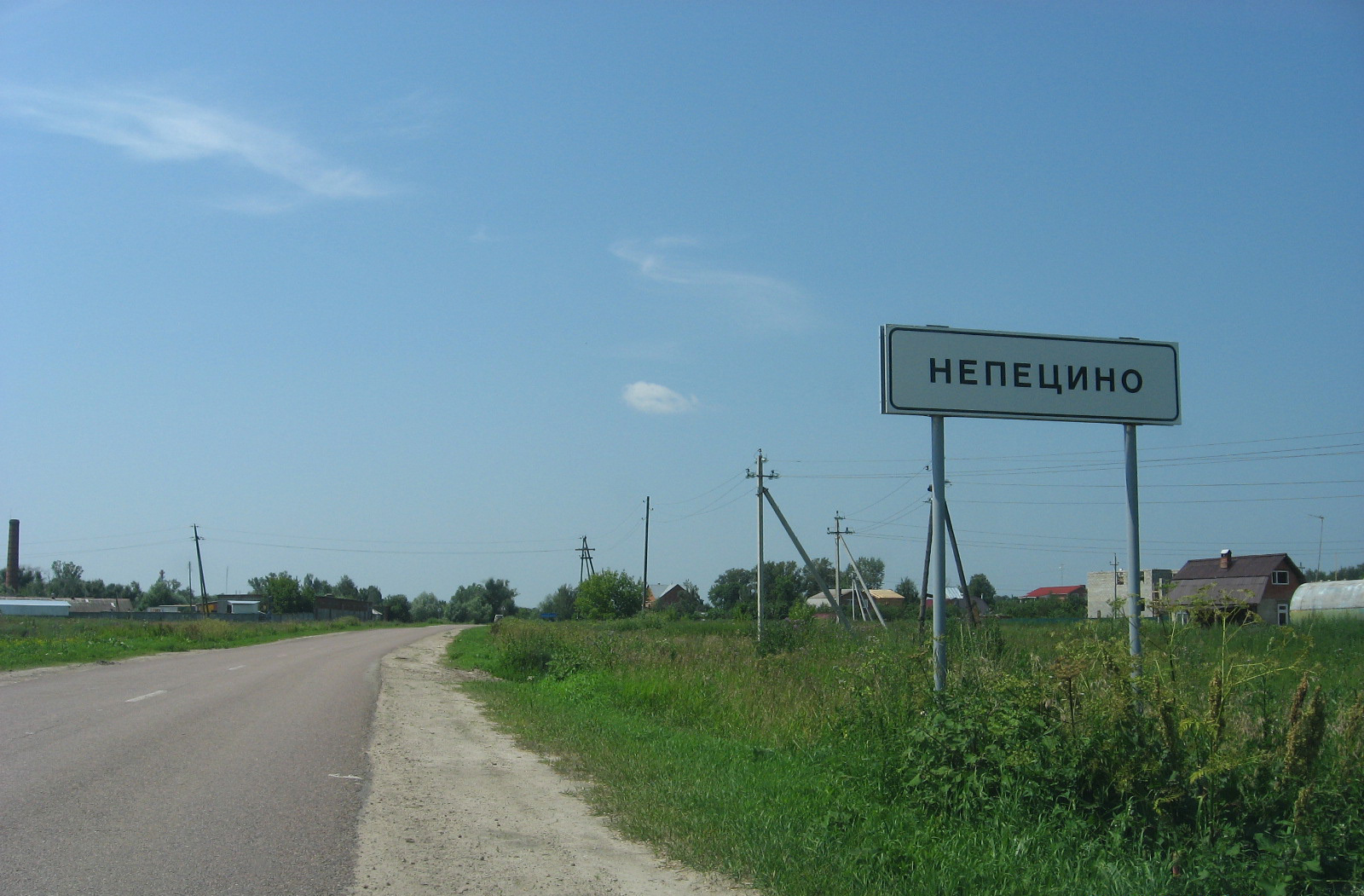 Знак на въезде в село Непецино Коломенского района